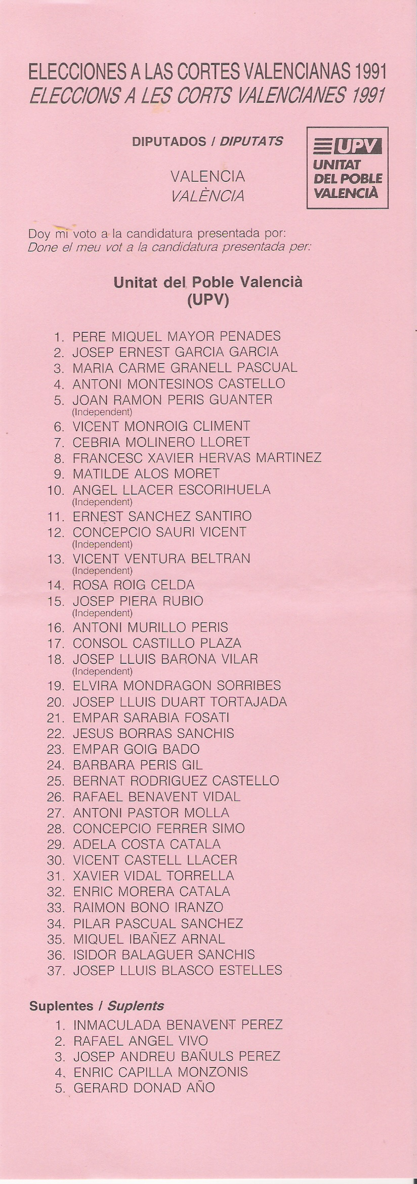 Papeleta electoral de la Unitat del Poble Valencià (UPV) por la provincia de Valencia para las Cortes Valencianas, en 1991.